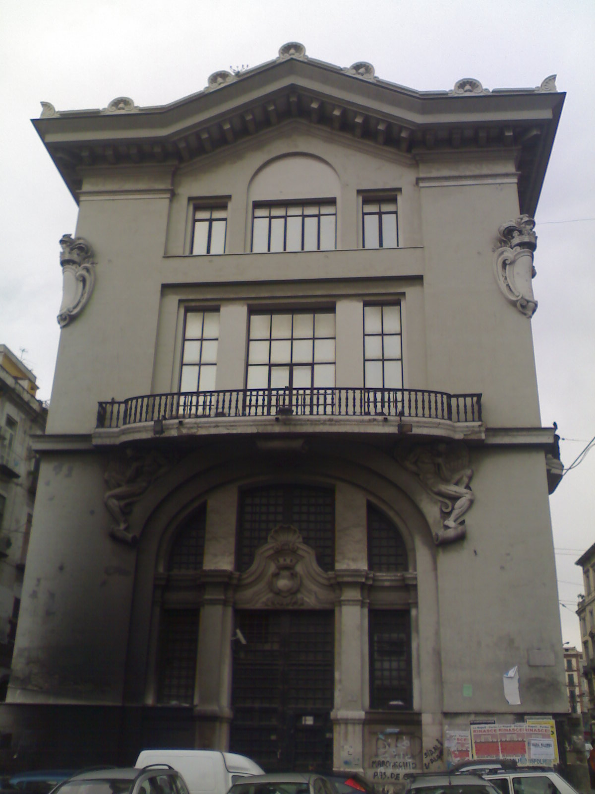 Palazzo monumentale presso la stazione centrale di Napoli